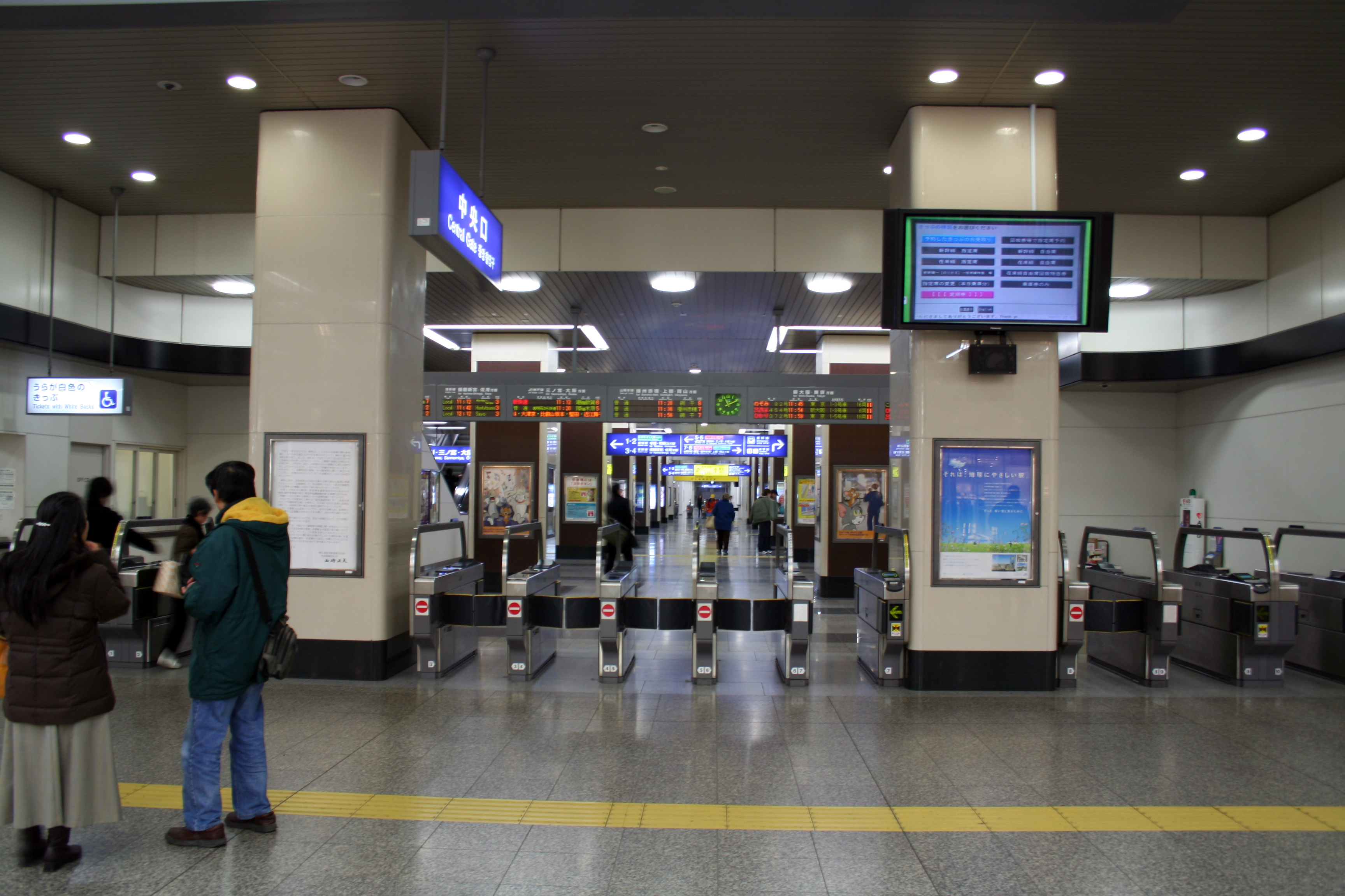 ほぼ正面から見た姫路駅中央改札口。